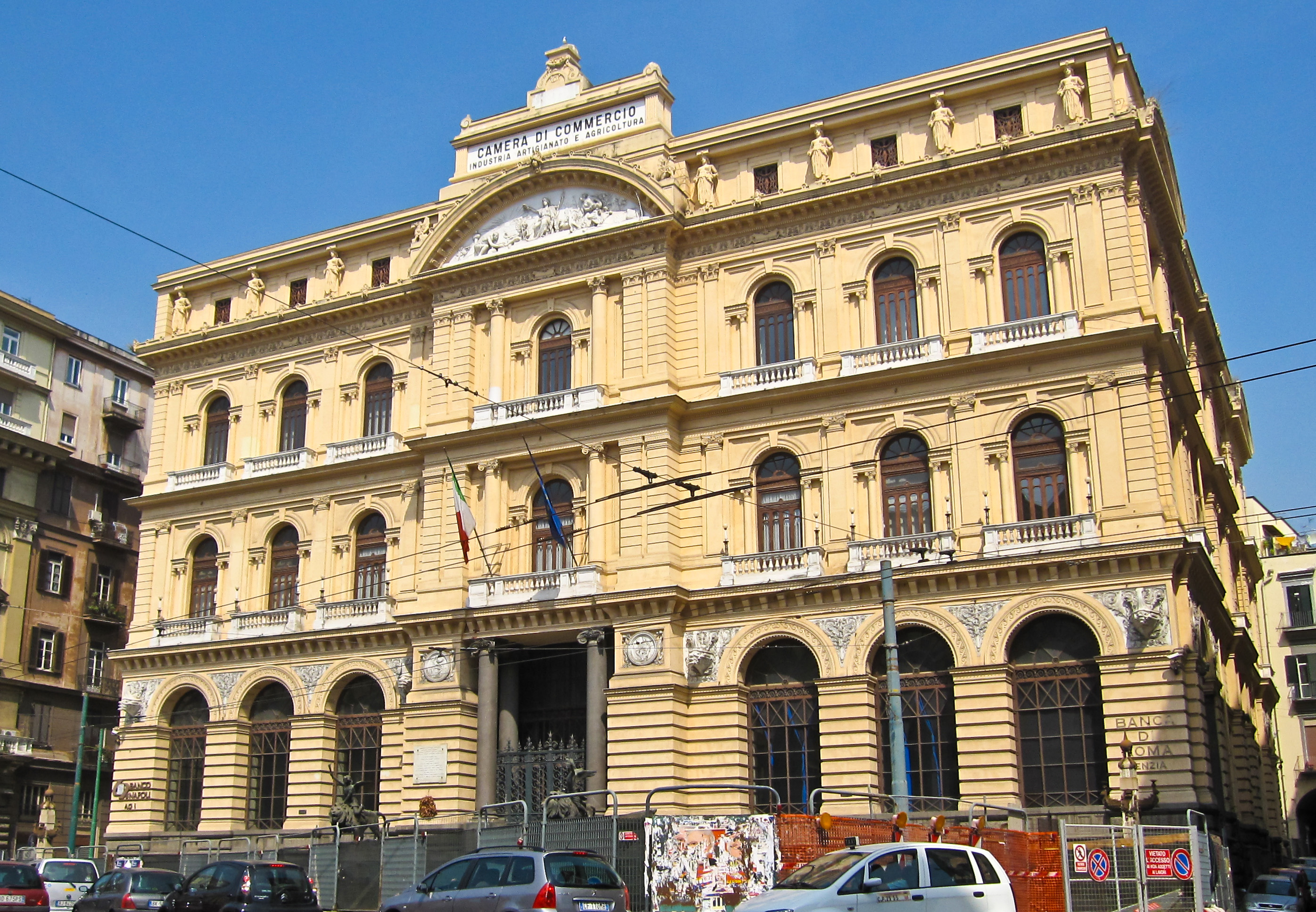 Palazzo della Borsa In Piazza Bovio - Napoli